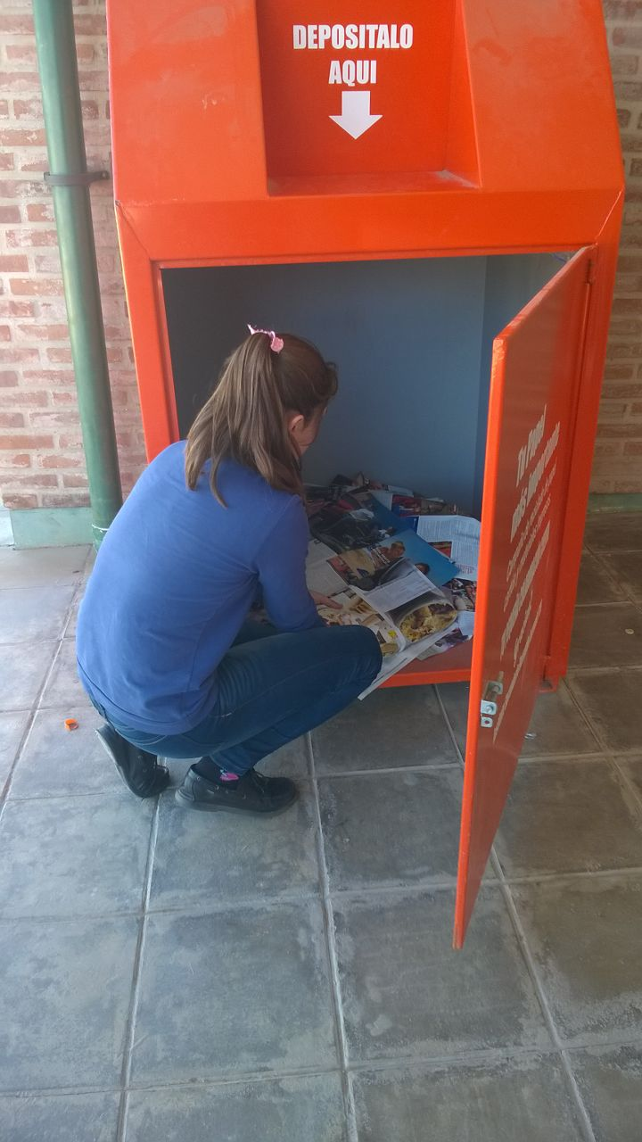 Campaña de Reciclado de papel y cartón de alumnos en el Instituto Secundario Bernardo Larroudé, La Pampa, Argentina.